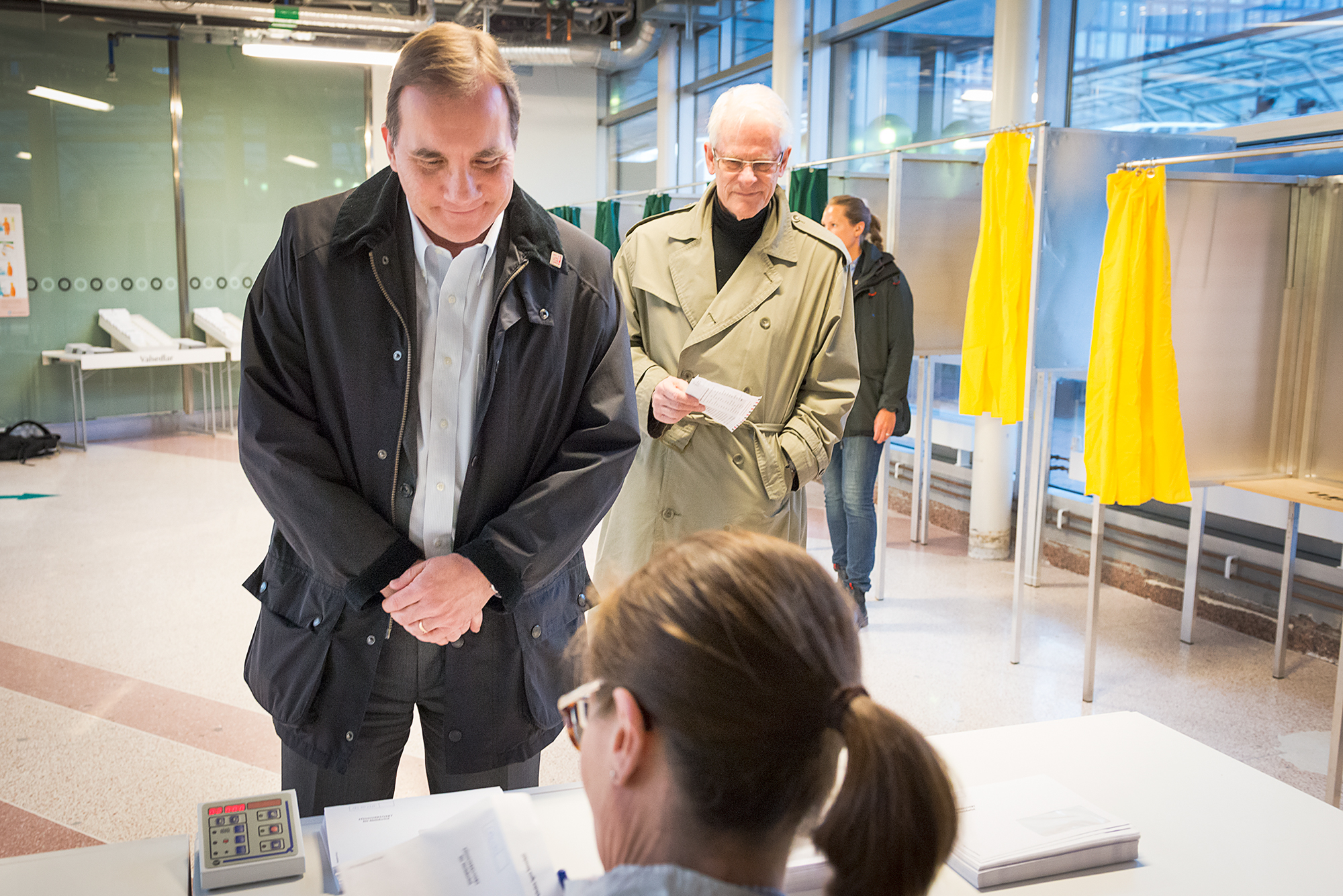 Stefan Löfven och Ingvar Carlsson förtidsröstar i EU-parlamentsvalet, Cityterminalen, Stockholm. Foto: Anders Löwdin